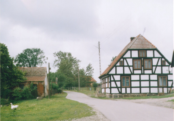 Zabudowa wsi